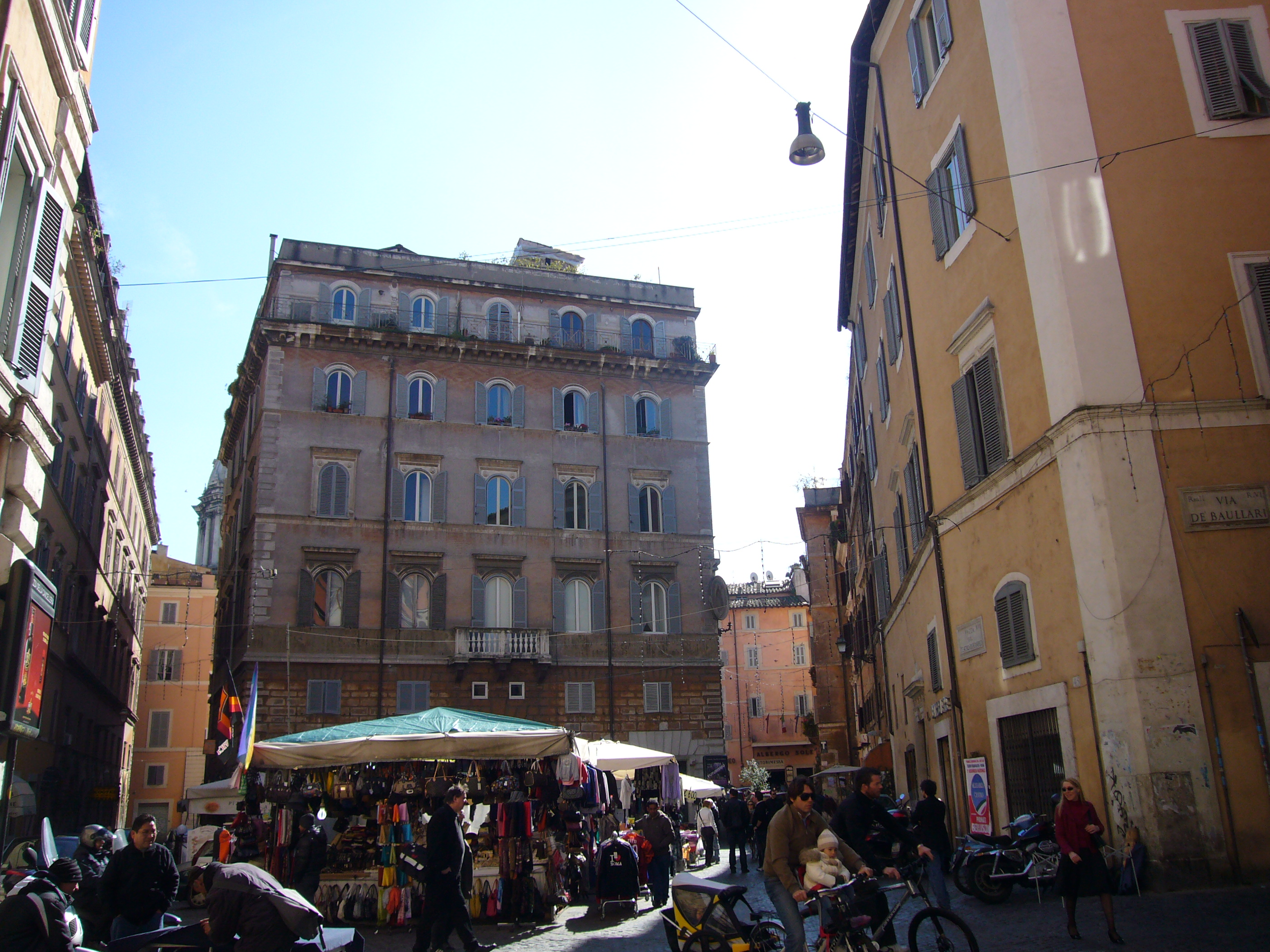 Roma, piazza del Teatro di Pompeo e meratino